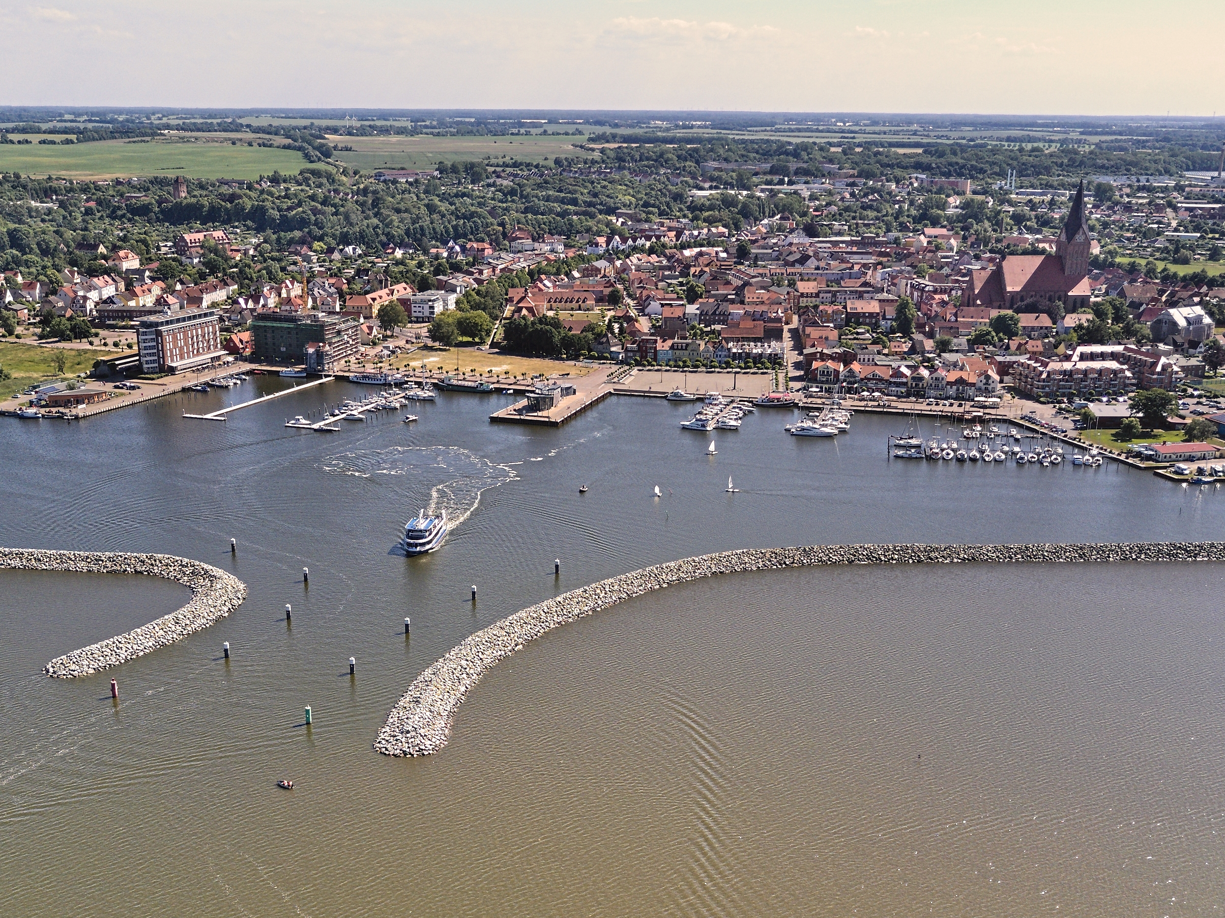 Fahrgastschiff SEEHEILBAD ZINGST verlässt den Barther Hafen, im Hintergrund die Altstadt